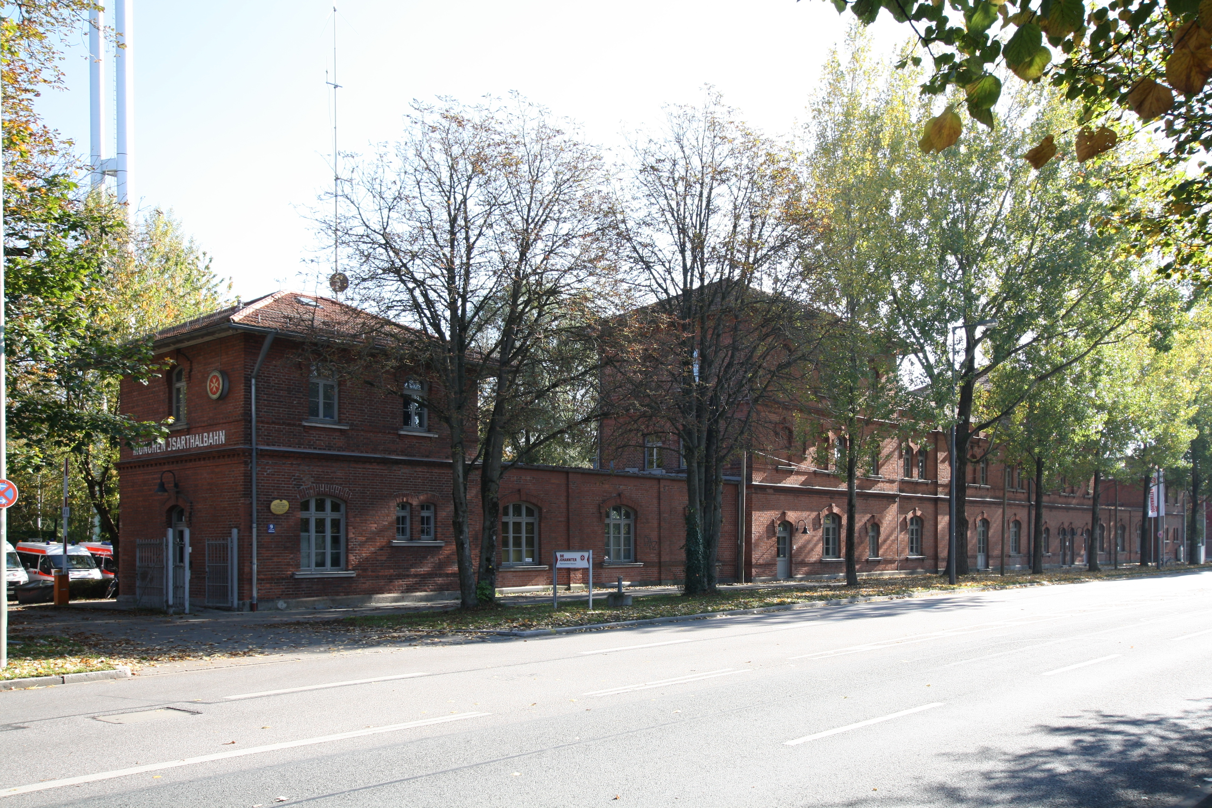 München, ehemaliger Isartalbahnhof, jetzt Zentrum der Johanniter-Unfallhilfe